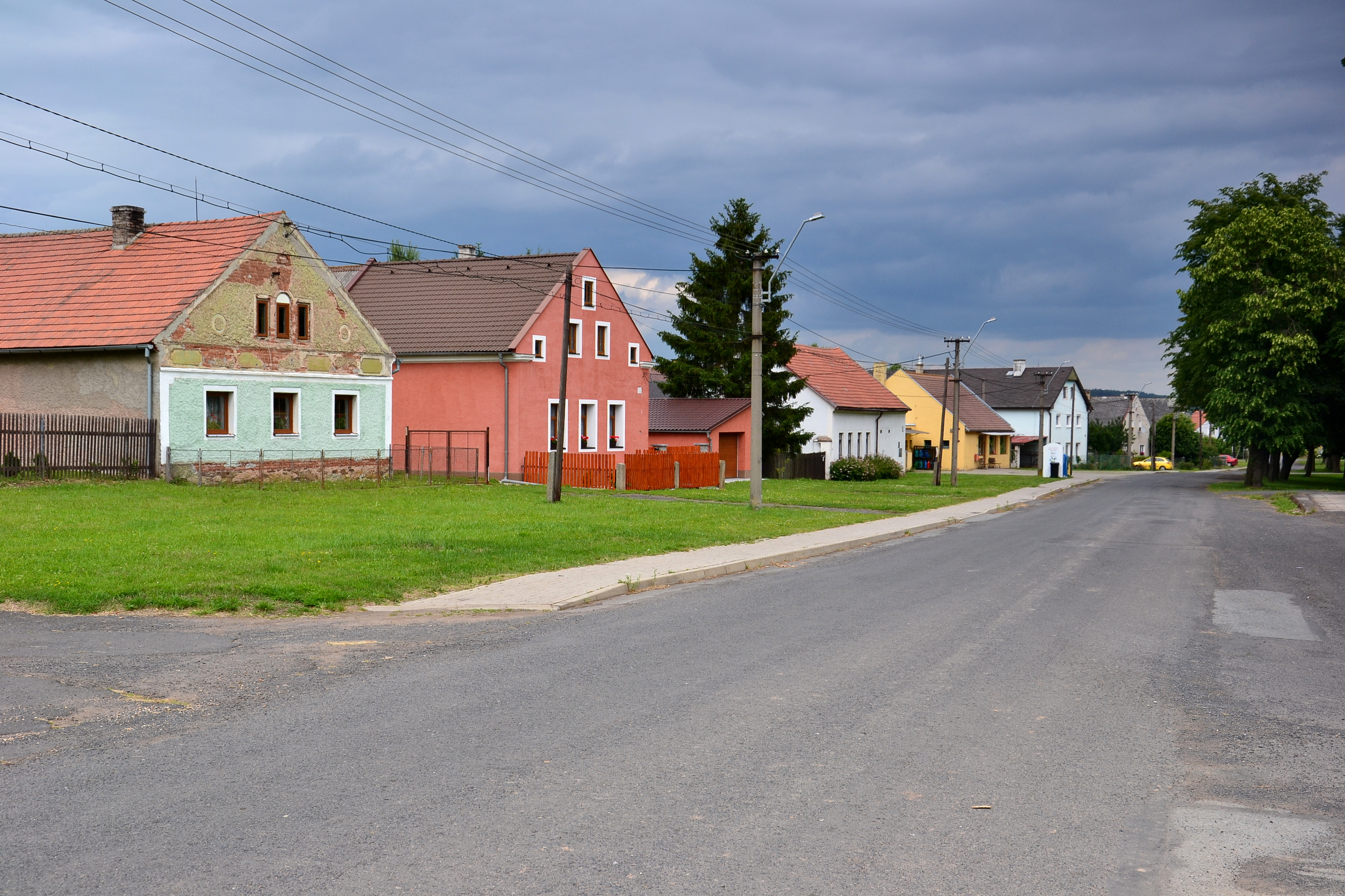 Náves